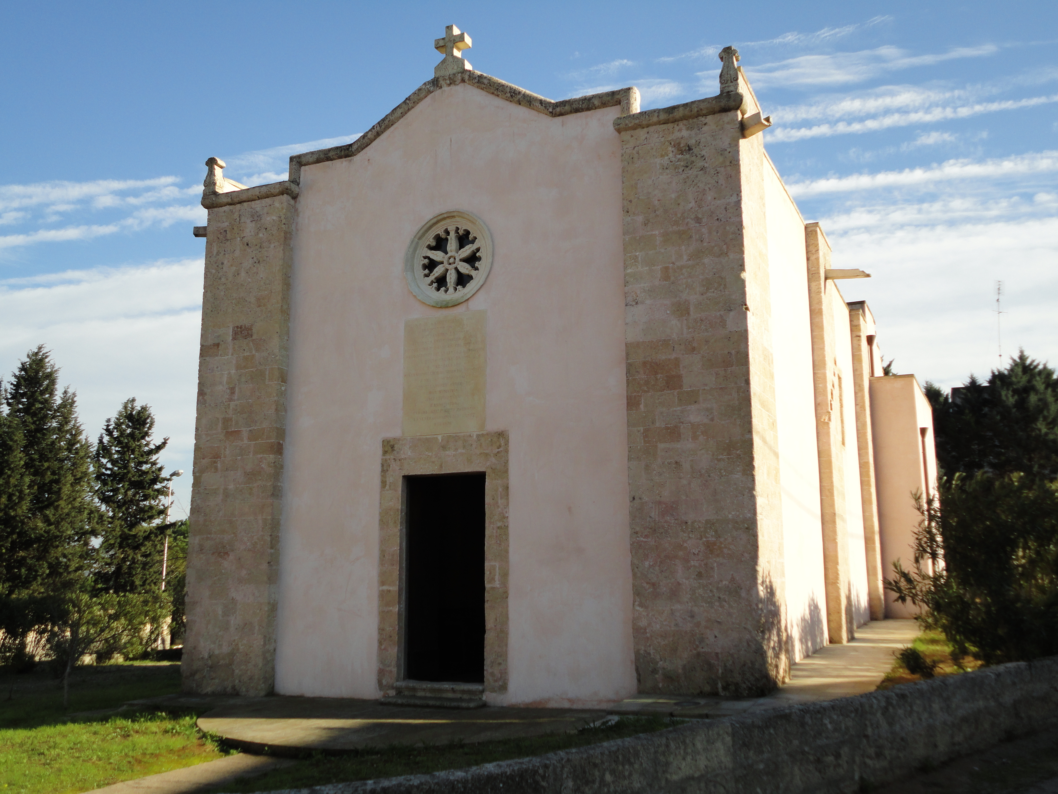 Chiesa San Nicola Specchia, Lecce